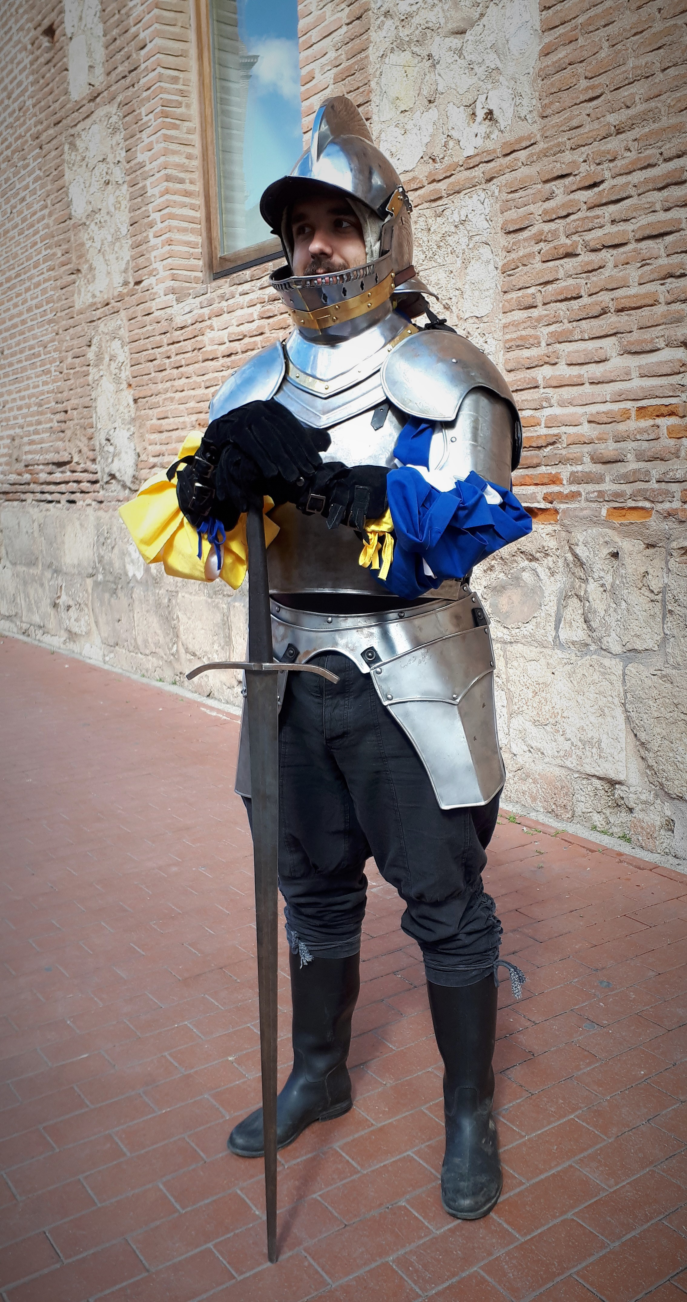 Indumentaria de un soldado español de infantería, durante la Batalla de Lepanto en 1571. Ropaje diseñado por la "Asociación Cultural Histórica Picas a Caballos" de Guadalajara (España).